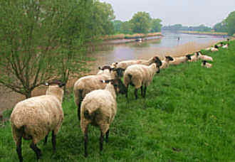 Ostedeich bei Oberndorf Eig. Aufn., gemeinfrei